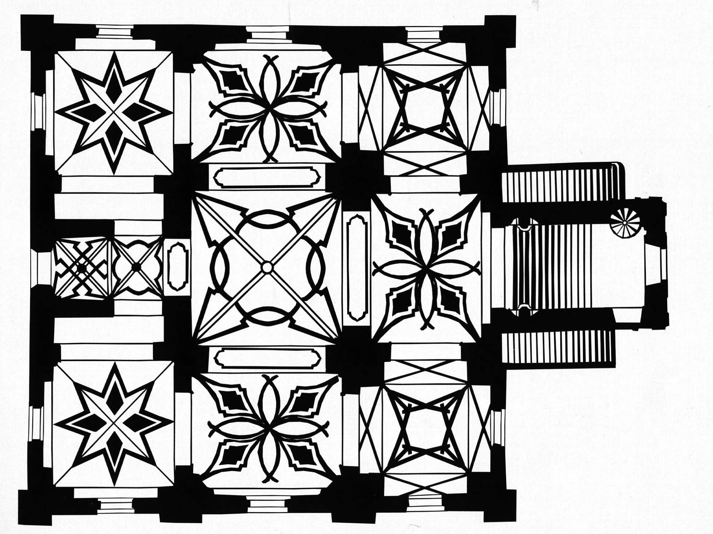 Půdorys Kostnice, Sedlec